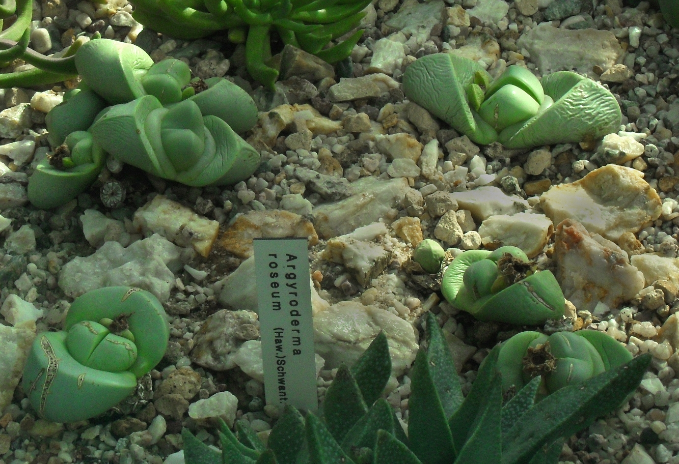 Argyroderma roseum - Botanischer Garten Leipzig